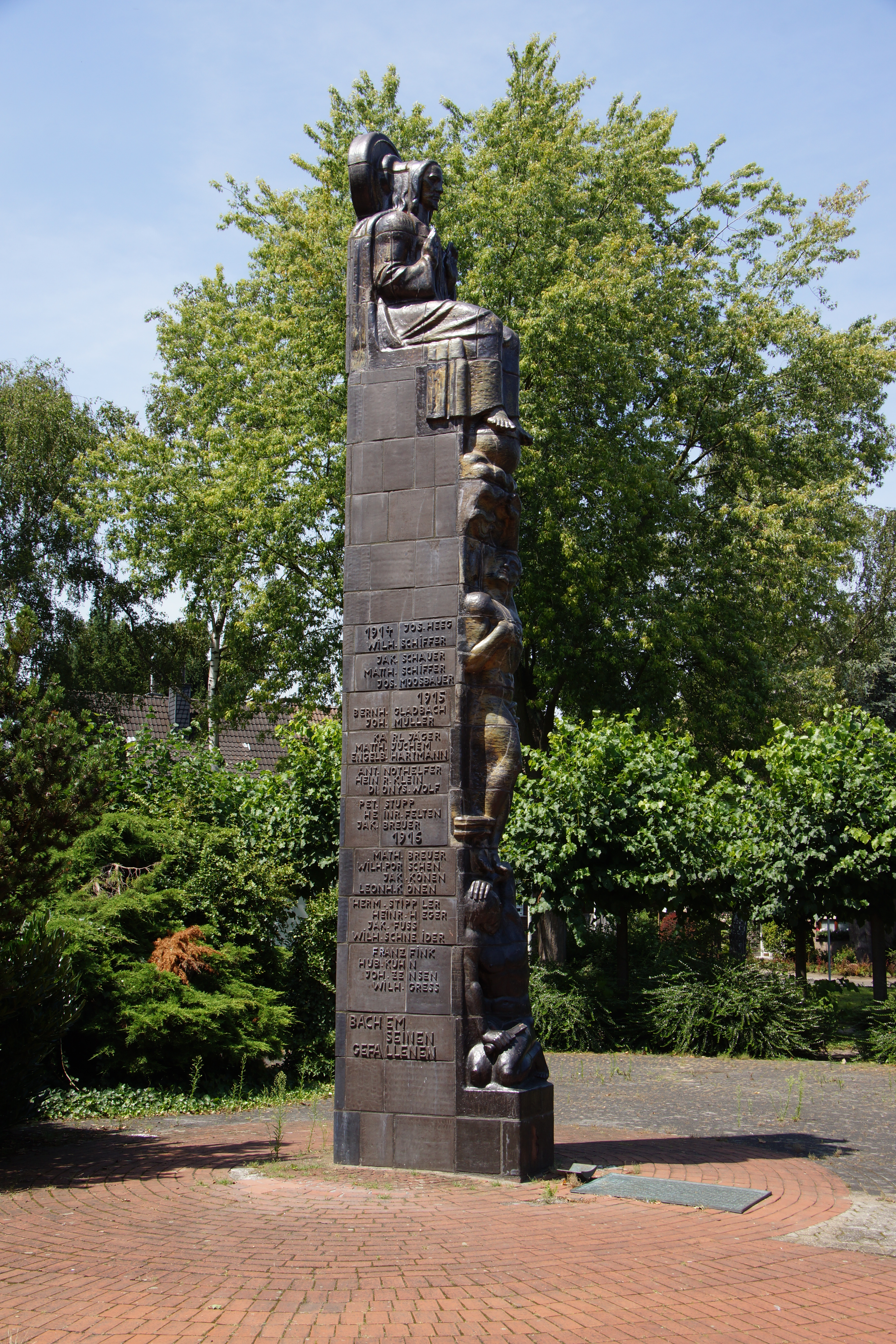 Kriegerdenkmal in Bachem This is the photograph of an architectural monument. It is part of the list of cultural monuments of Frechen, no. A 58